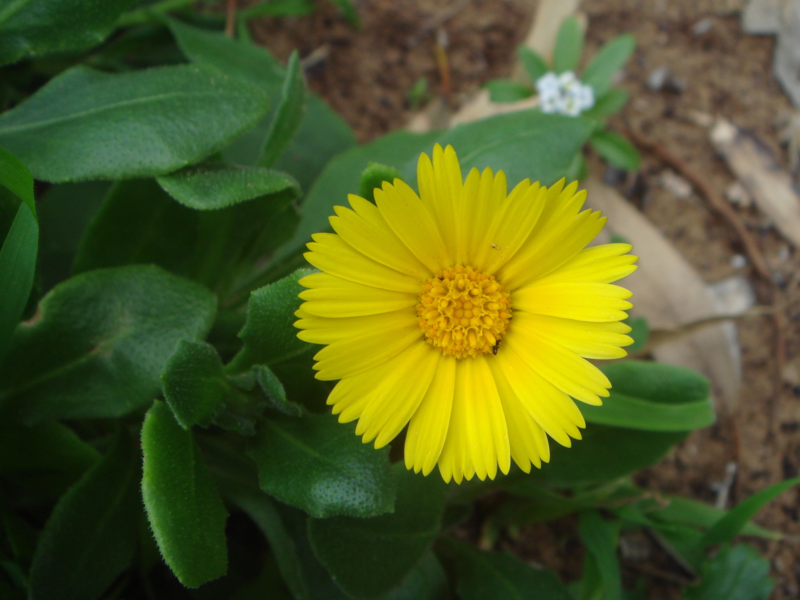 Calendula suffruticosa subsp. lusitanica (Boiss.) OhlePinar de la Barrosa, Chiclana, (Cádiz) España